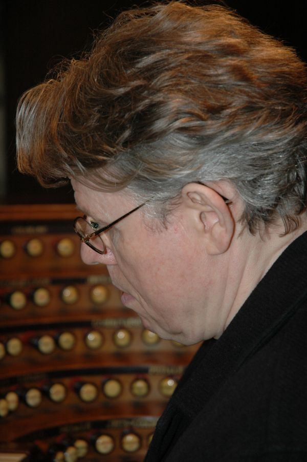 Photo de Daniel ROTH